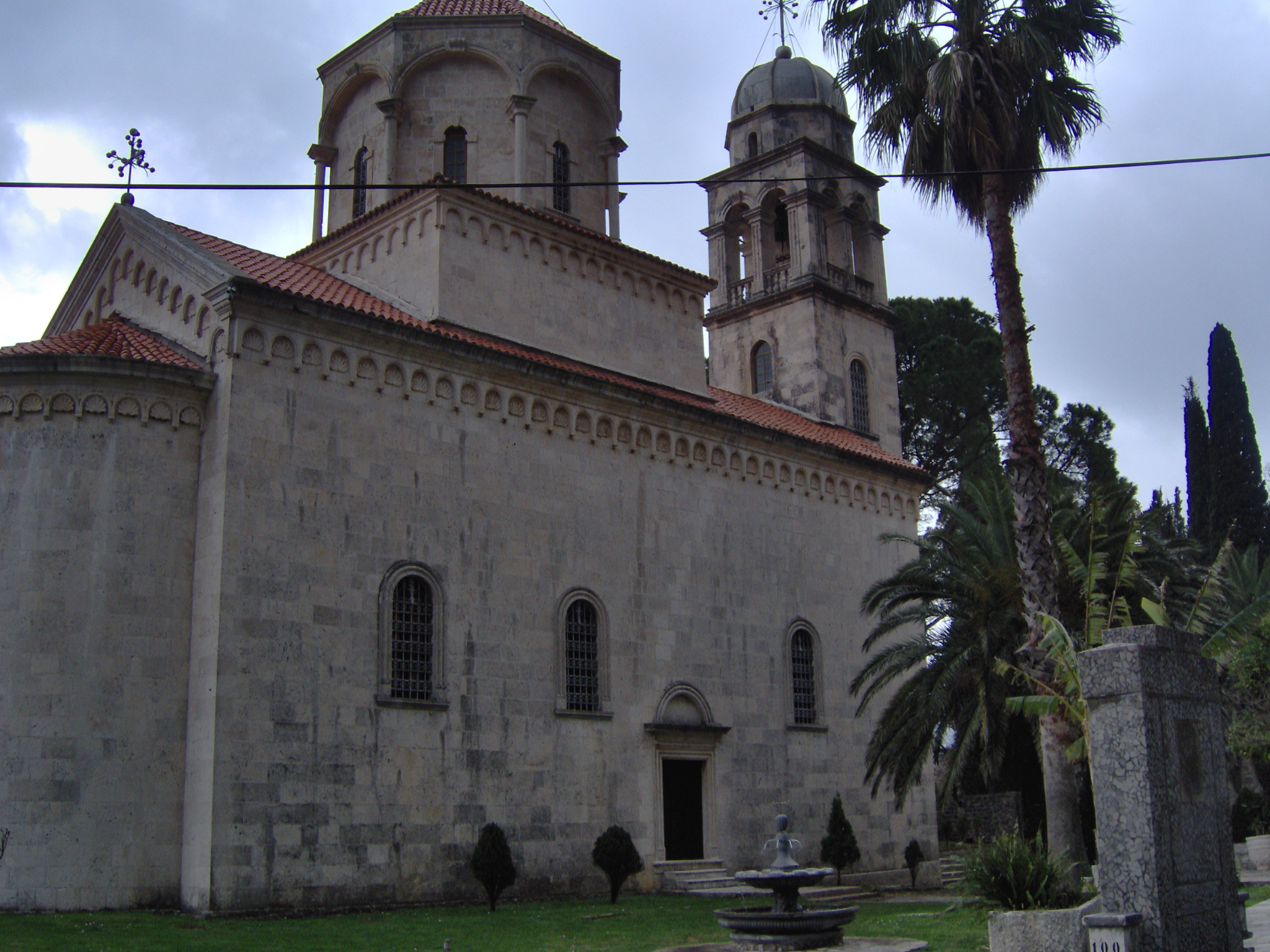 Kloster Savina i Herceg Novi, februari 2007